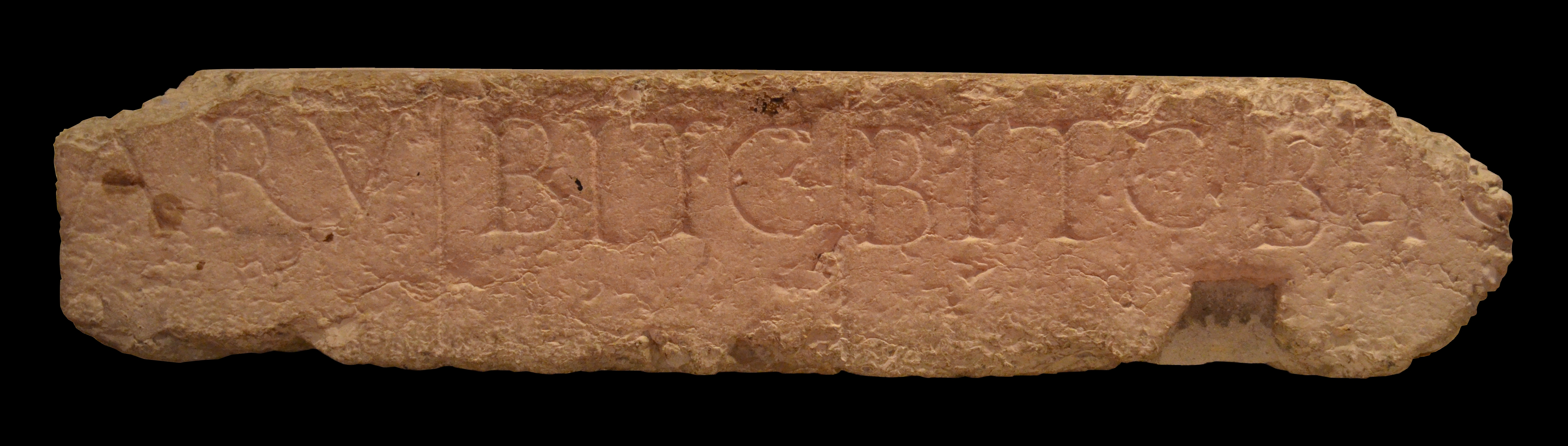 Musée gallo-romain de Fourvière (Lyon) - Gradin de l'amphithéâtre des Trois Gaules - [...] ARV(ernis) / BIT(urigibus) C(ubis) : Arvernes, Bituriges Cubes